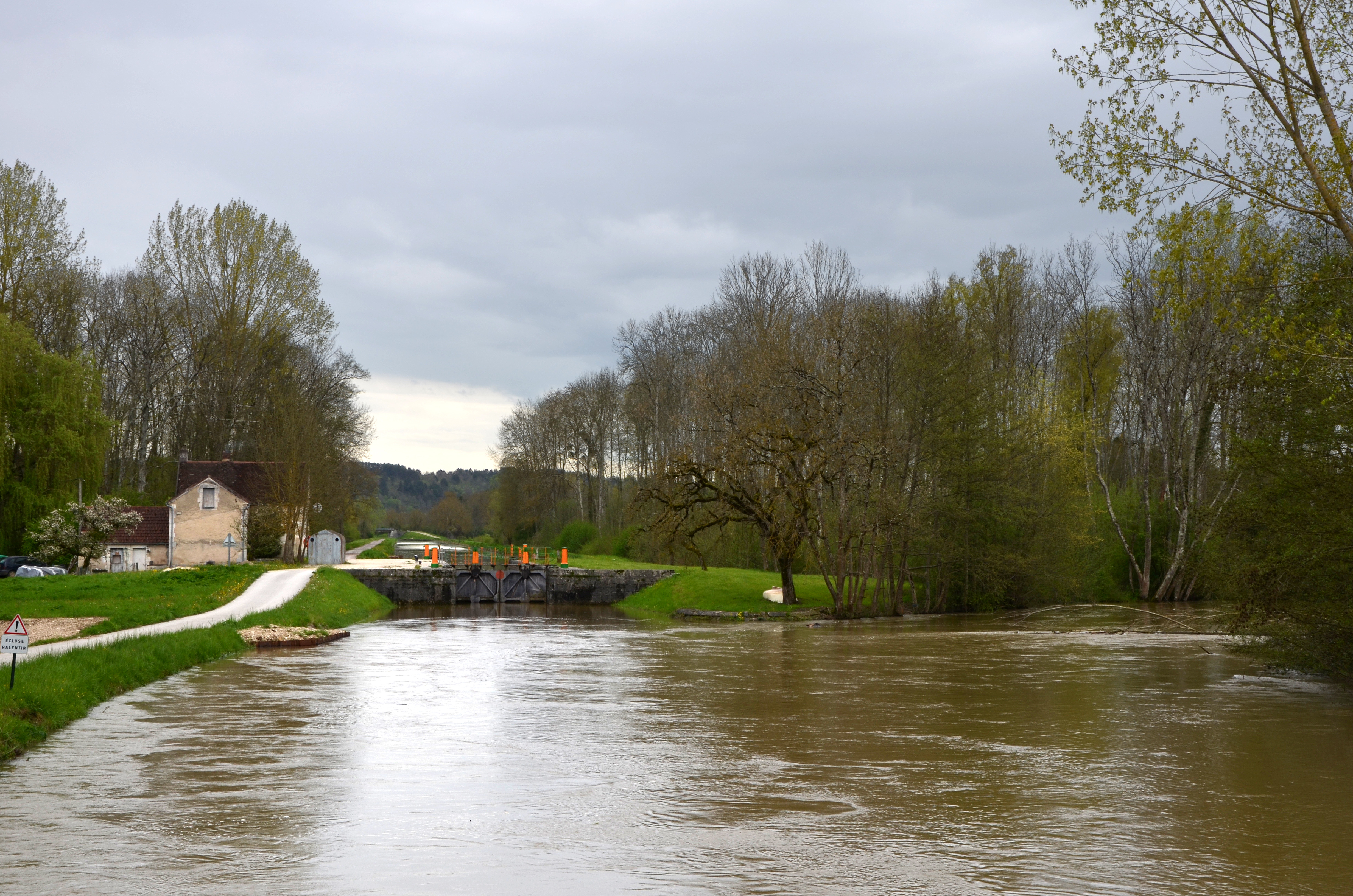 L'Yonne et le canal du Nivernais vers Séry, Yonne, France